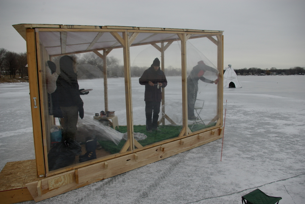 Jan 13, 2007